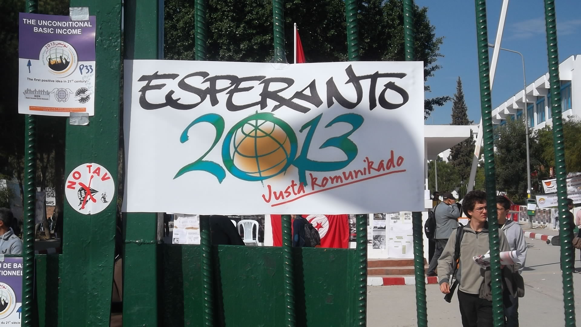 Esperanto dum la Monda Socia Forumo 2013.